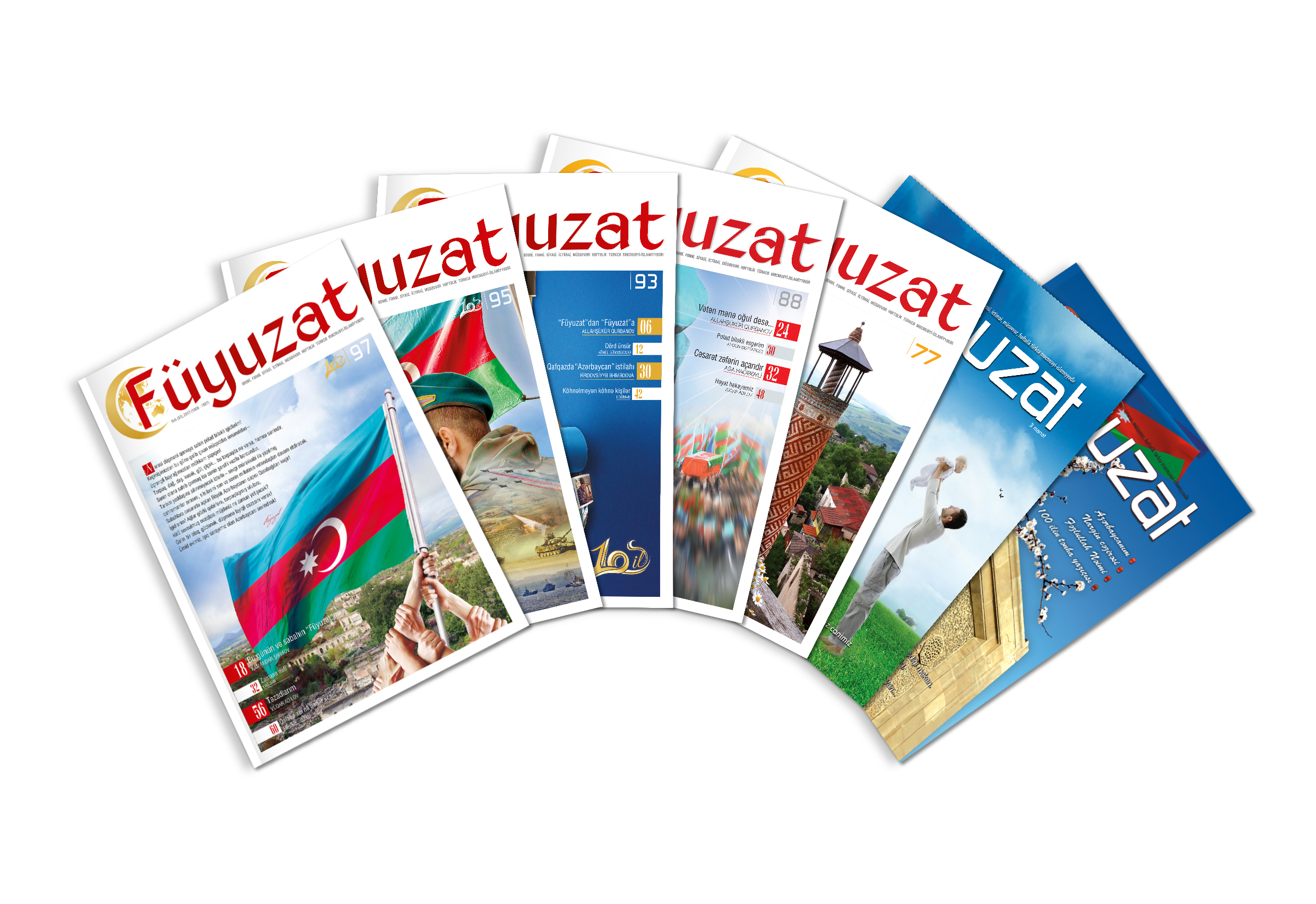 "Füyuzat" jurnallarından...